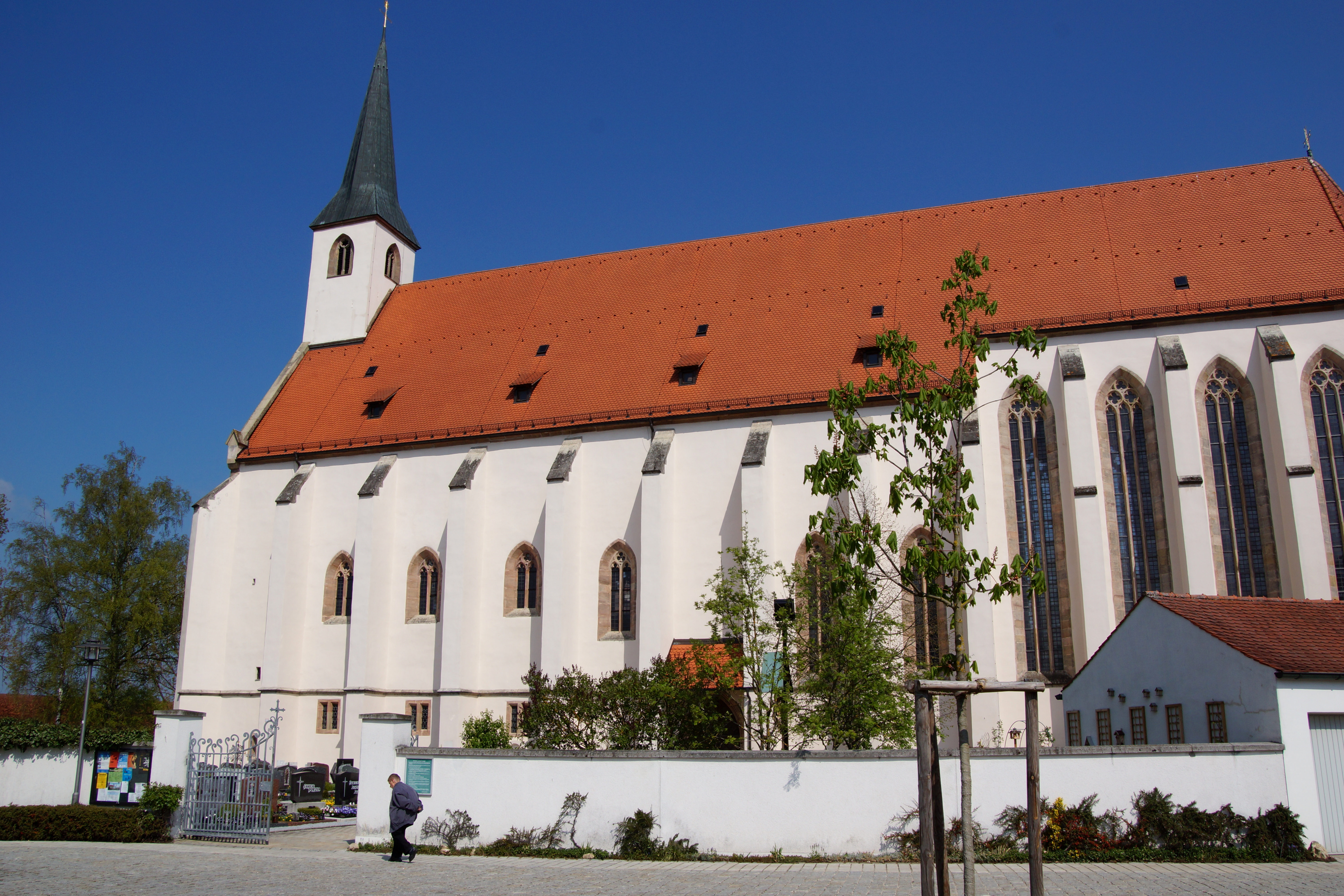 Kloster Seligenporten (Kreis Neumarkt in der Oberpfalz)